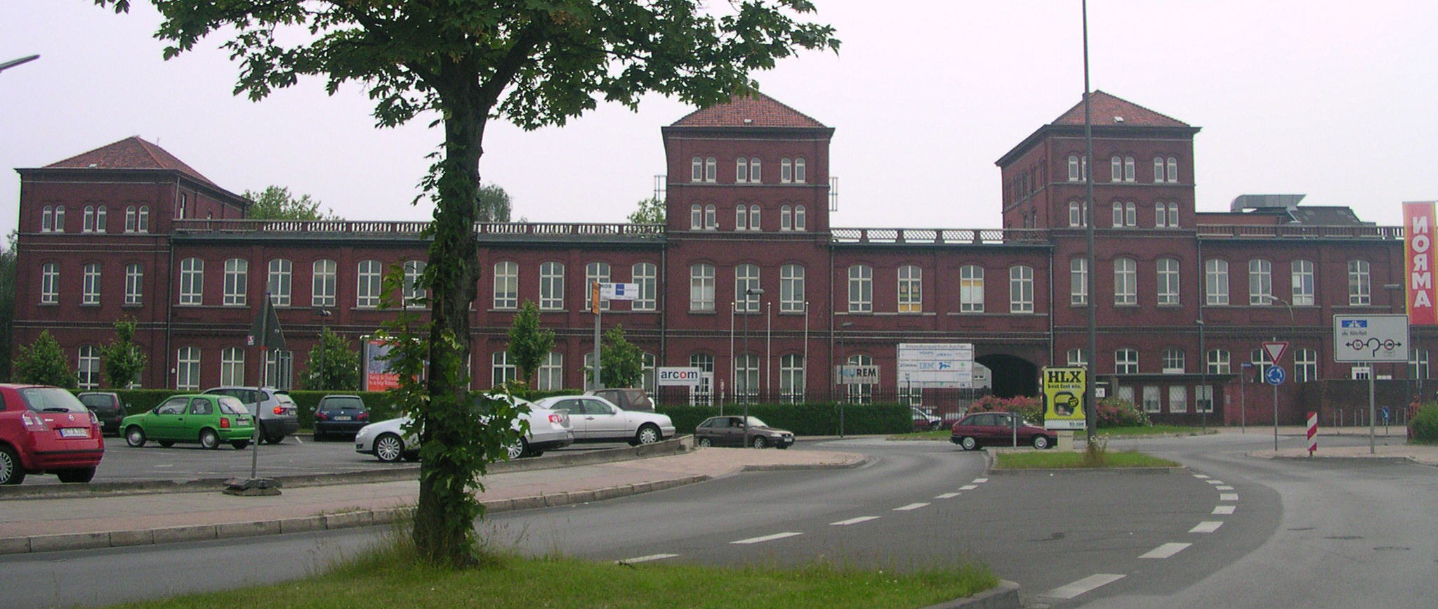 Aachen, ehemaliges Hüttenwerk Rothe Erde, heute Continental Reifenwerk